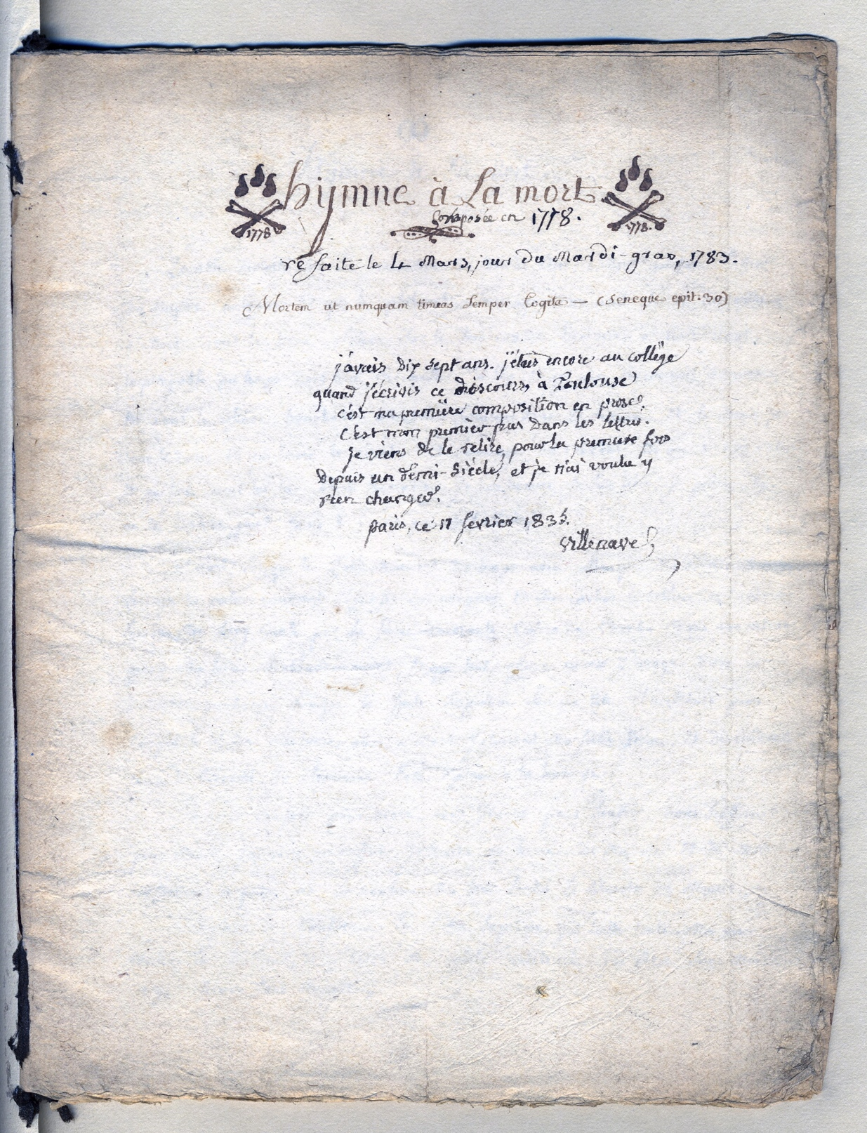 Page-titre du premier manuscrit de l'auteur